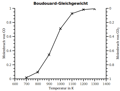 Das Boudouard-Gleichgewicht von 700 bis 1300 K berechnet aus den Freien Bildungs- enthalpien für CO und CO2.